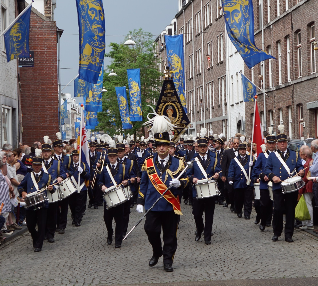 Heiligdomsvaart Maastricht, 1e Ommegang. Harmonie Wilhelmina, Wolder-Maastricht.